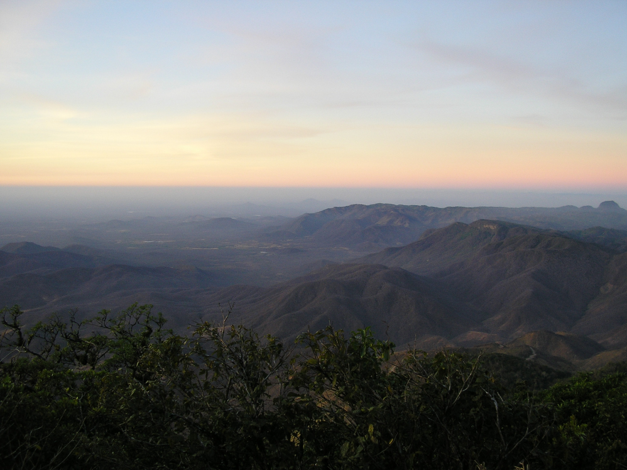 Pico Alto em Guaramiranga, Ceará, Brasil.